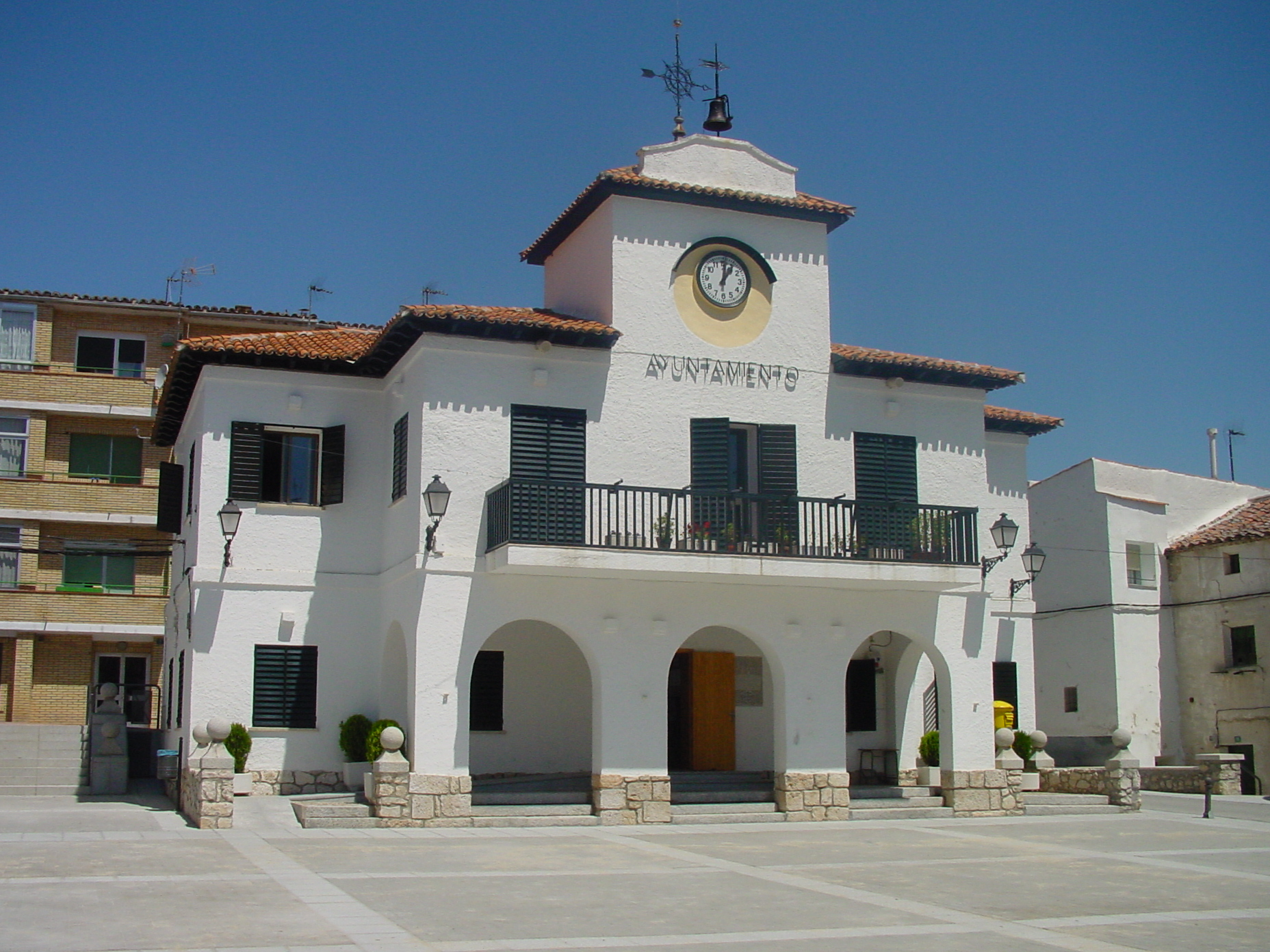 Ayuntamiento de Villar del Olmo.